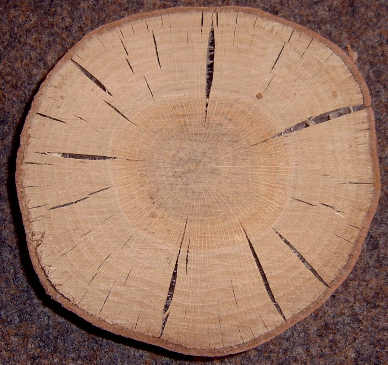 Foto taken by Lumbar 16:32, 6 November 2005 (UTC) in Osnabrück